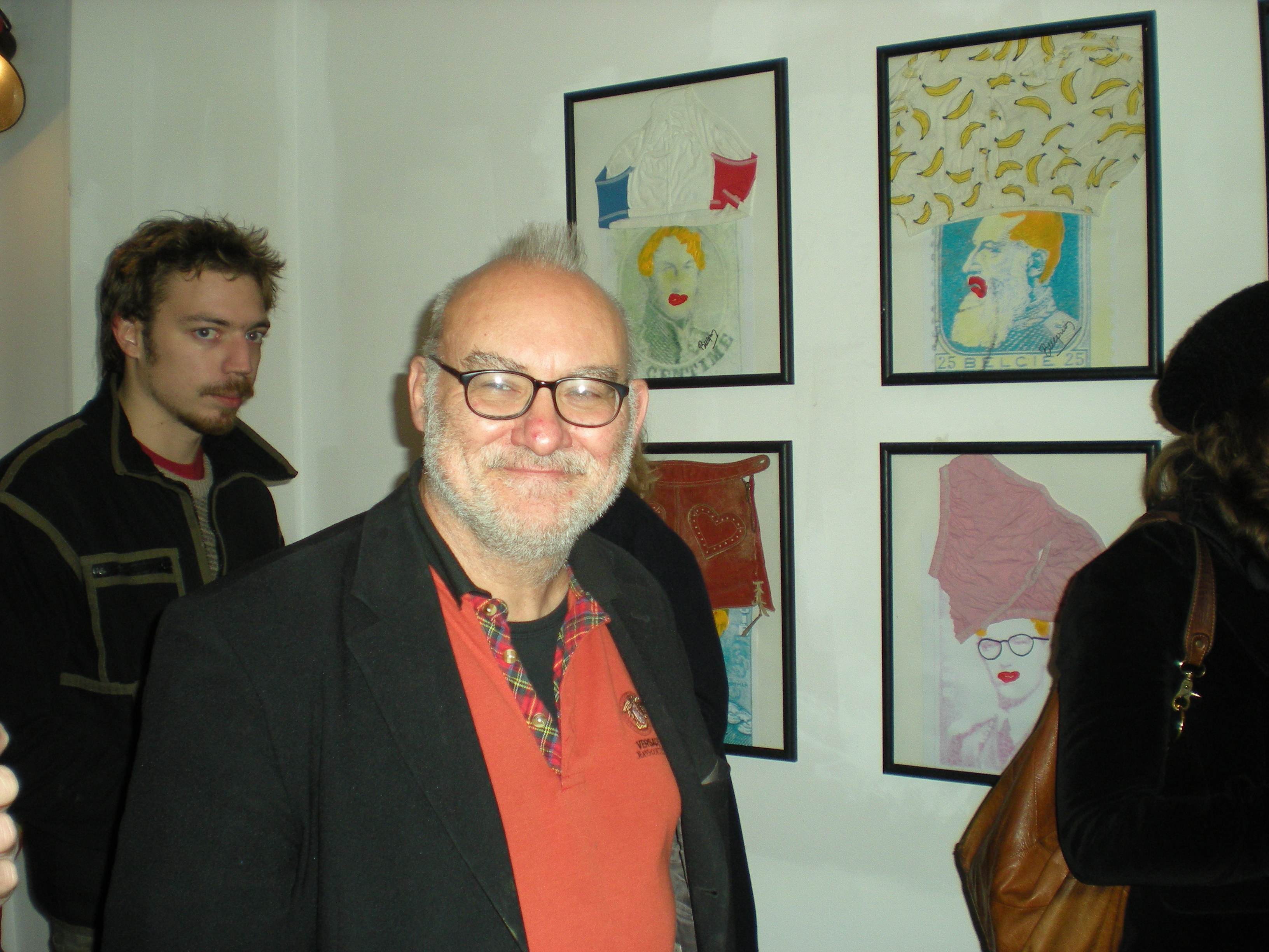 Jan Bucquoy lors du vernissage à la galerie Manaart à Bruxelles.